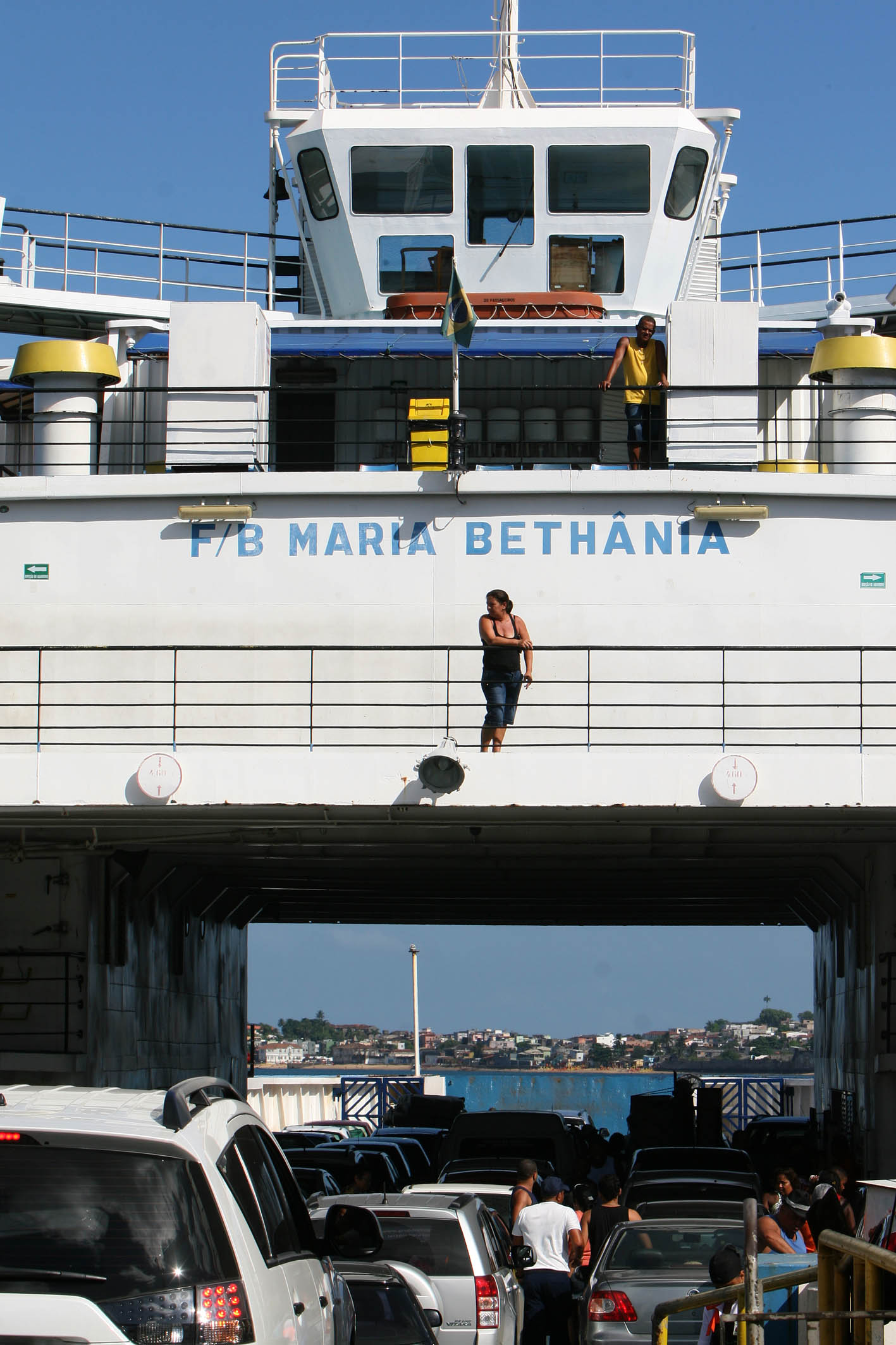 Movimentação de saída da cidade para o Ano Novo Na foto: Terminal de Ferry-Boat de São Joaquim Foto: Carol Garcia / SECOM